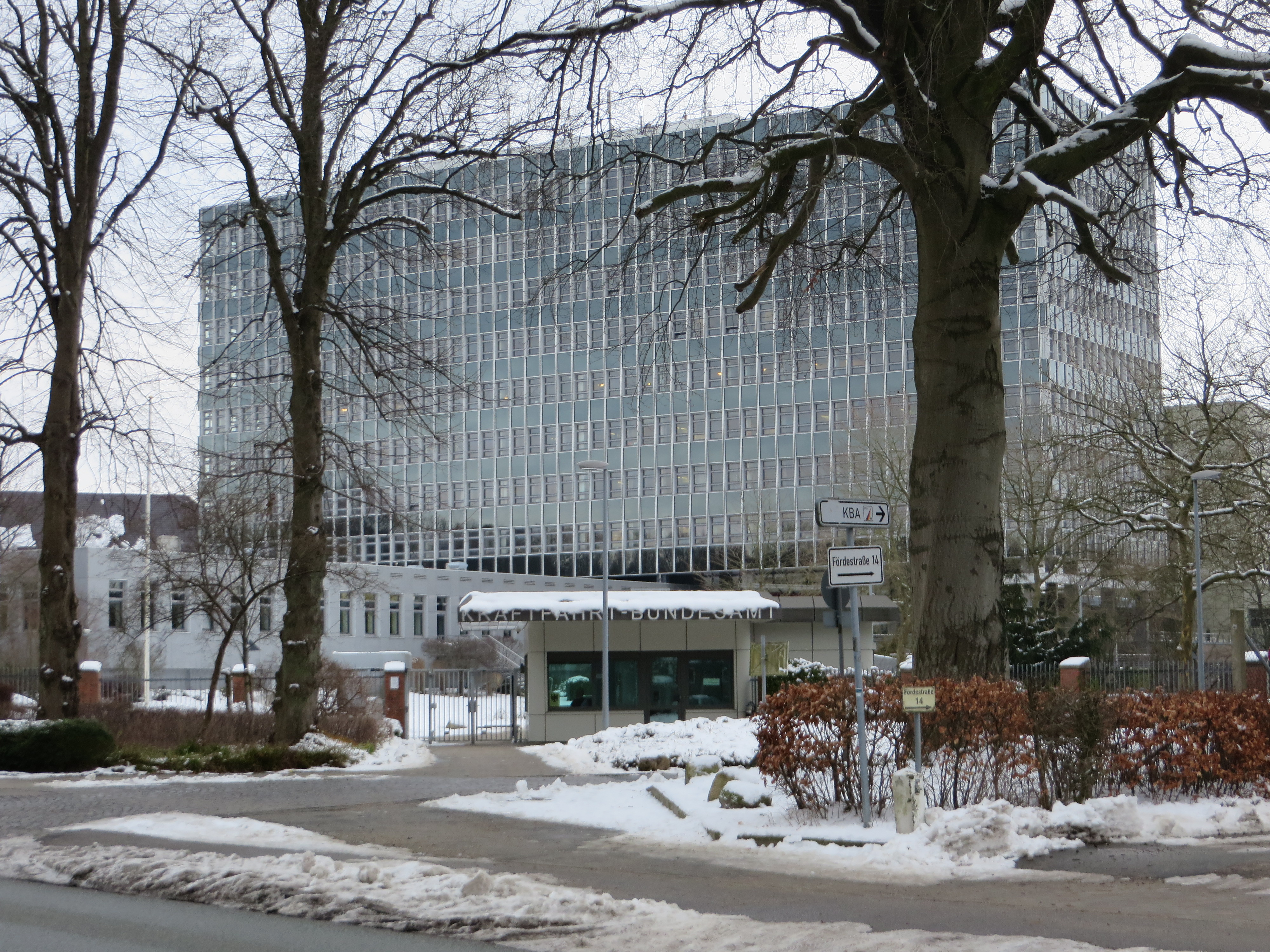 KBA (Flensburg-Mürwik, 3 Februar 2015), Bild 01